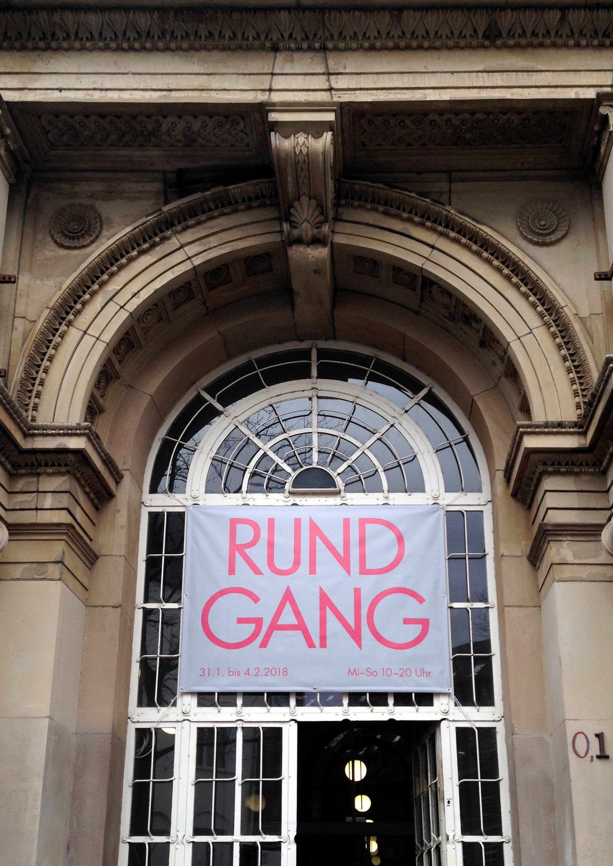 Eingang Kunstakademie Düsseldorf, mit Plakat Rundgang 31. Januar bis 4. Februar 2018